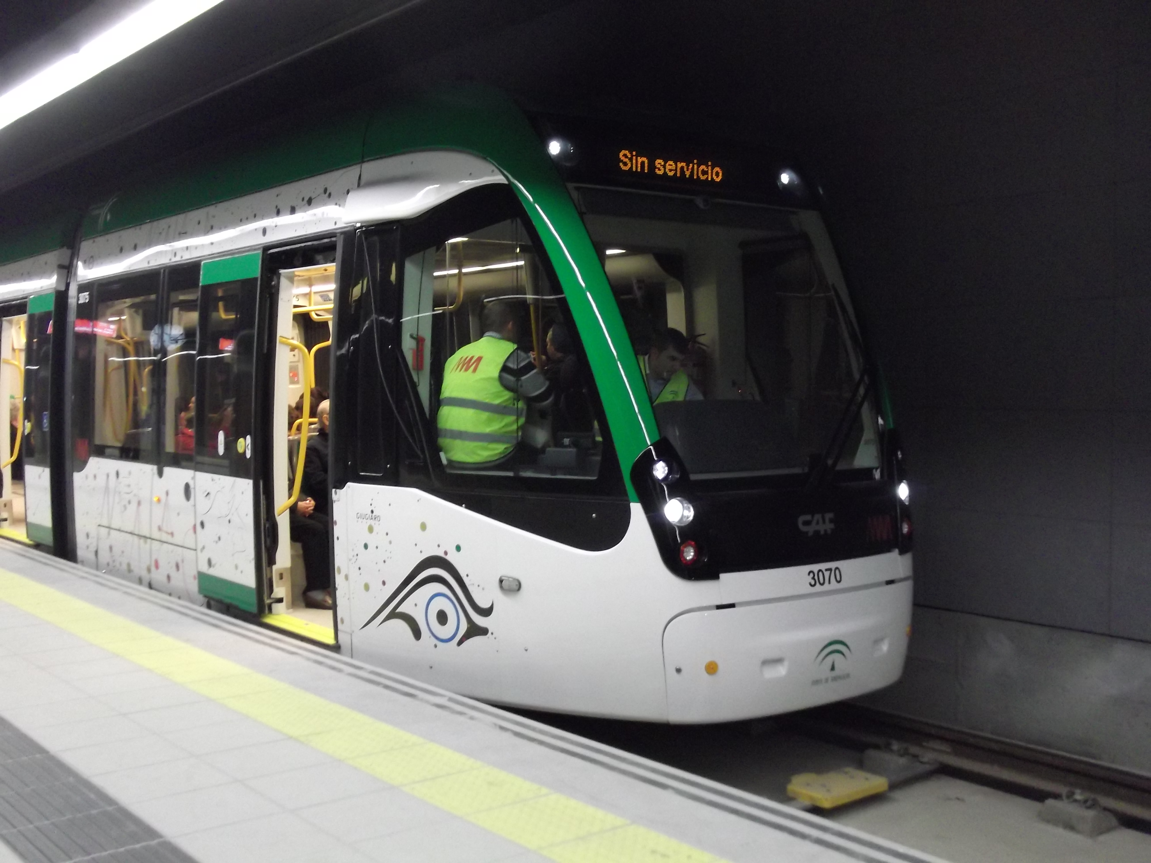 Tren del Metro de Málaga